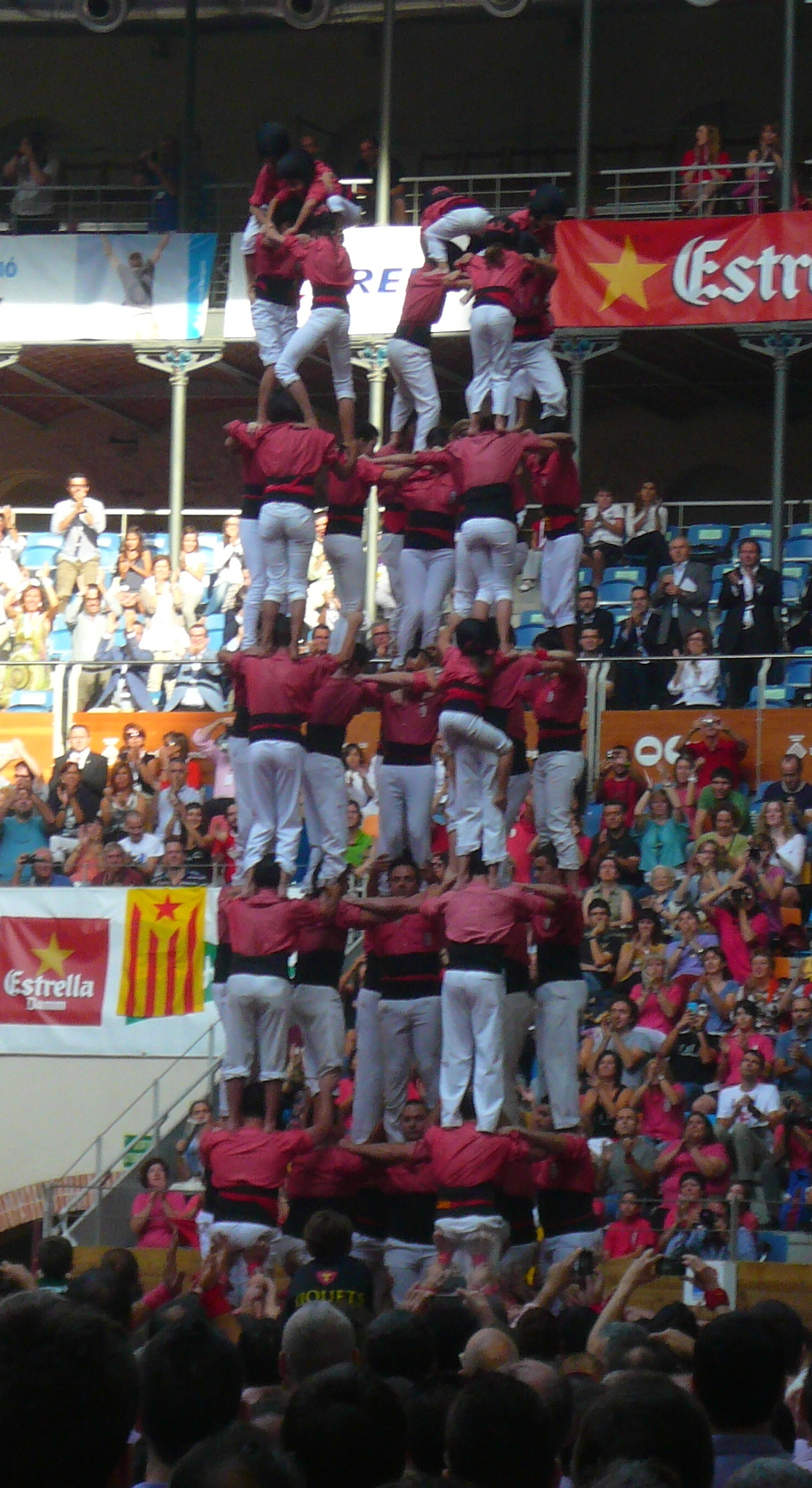 9 de 8 descarregat per la Colla Vella dels Xiquets de Valls en la primera ronda del XXIV Concurs de castells de Tarragona.